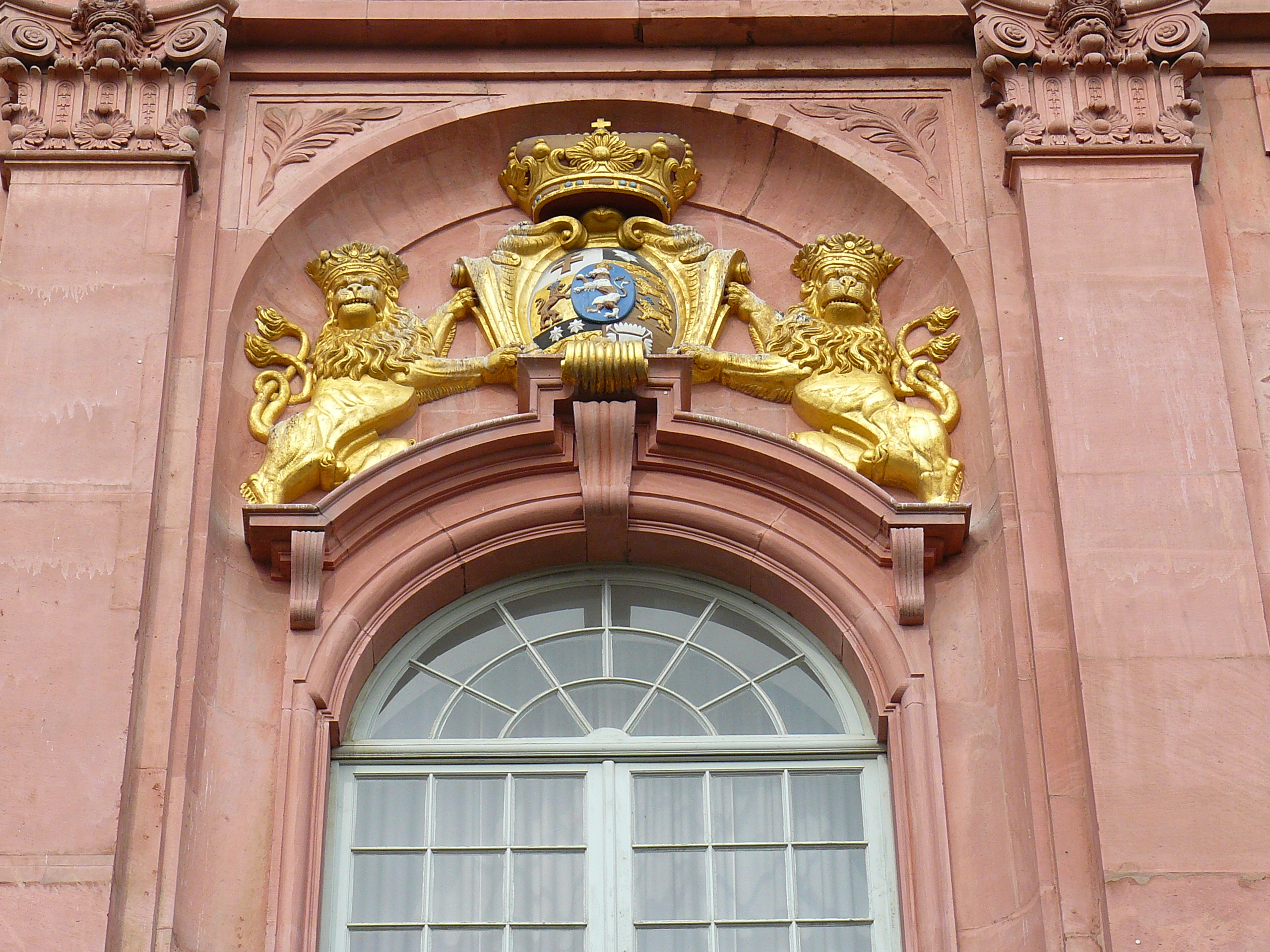 Residenzschloss Darmstadt - löwenumsäumtes Wappen am Mittelrisalit